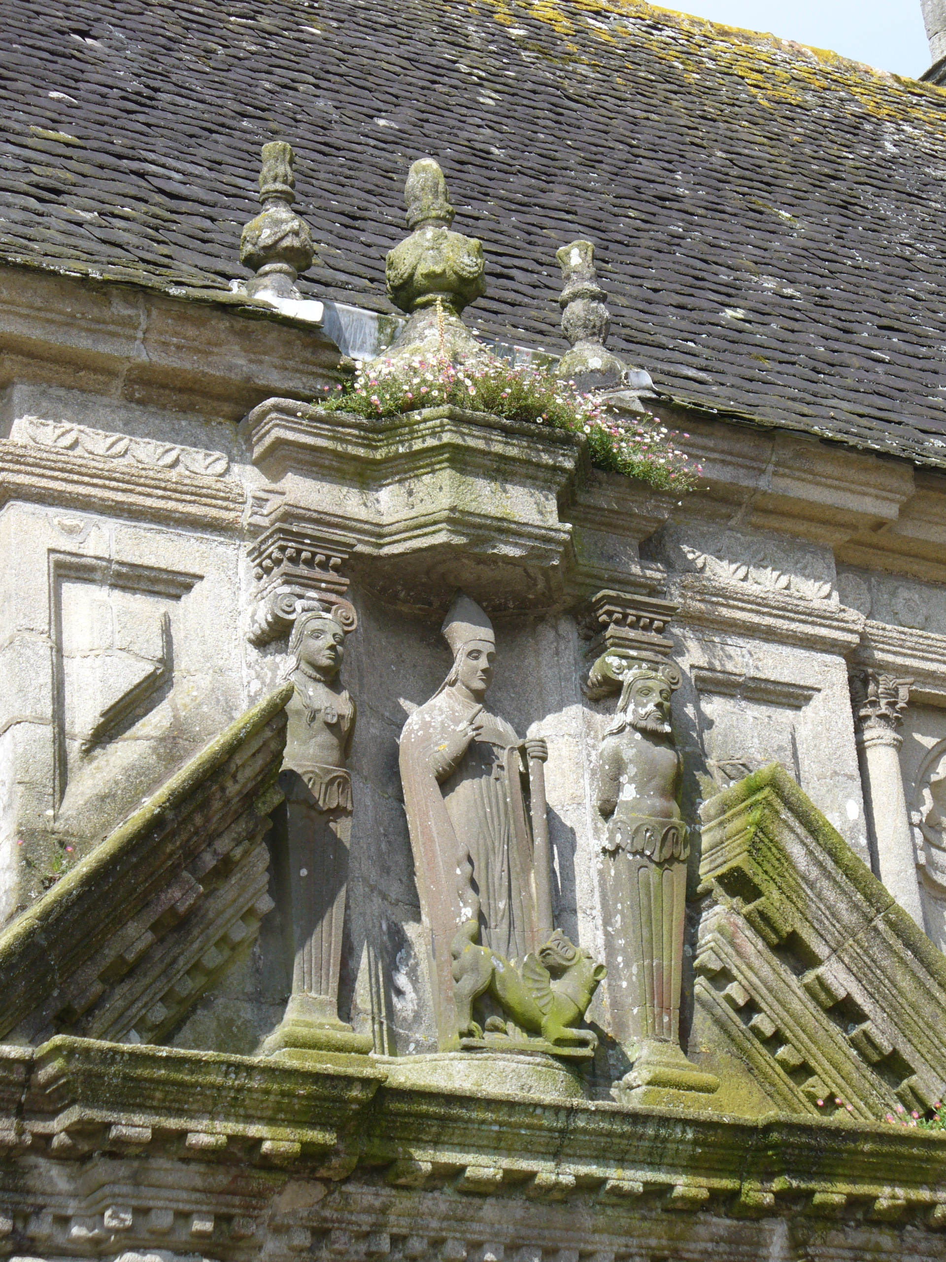 Saint Thegonnec-Beinhaus(ossuaire-1676-1682-Baumeister Jean le Bescond)- Im Giebel über den Eingang der Kirchenheilige Saint Thegonnec.Nach Kriegen oder Epidemien wurde aus Platznot die Gebeine der Toten nach 12 Jahren ausgegraben und in ein kunstvoll verziertes Beinhaus umgelagertzweistöckiger Renaissancebau mit korinthischen Halbsäulen